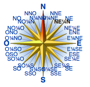 Pour discuter dans Discussion modèle:rose des vents/fr